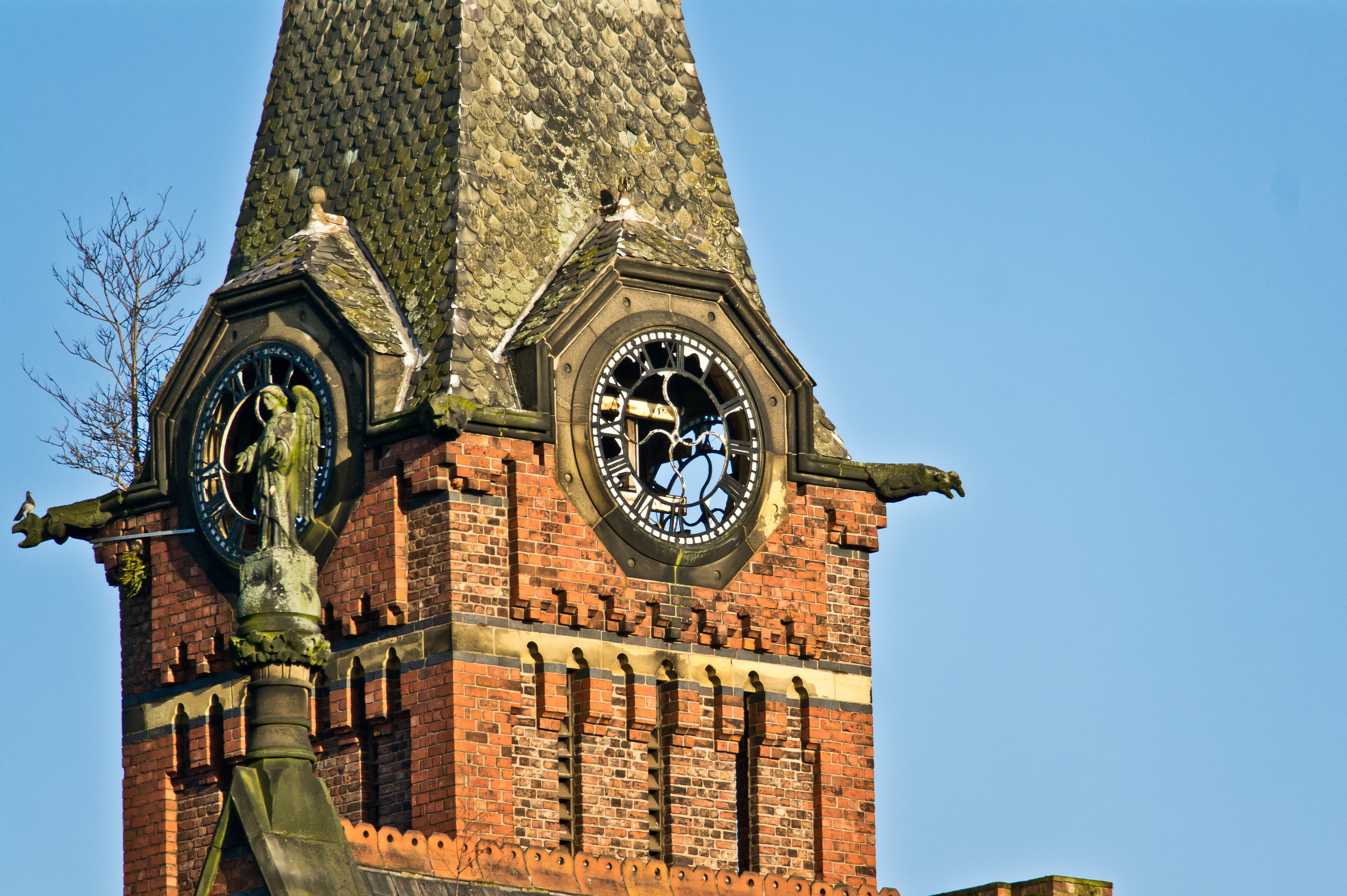 barnes (2)